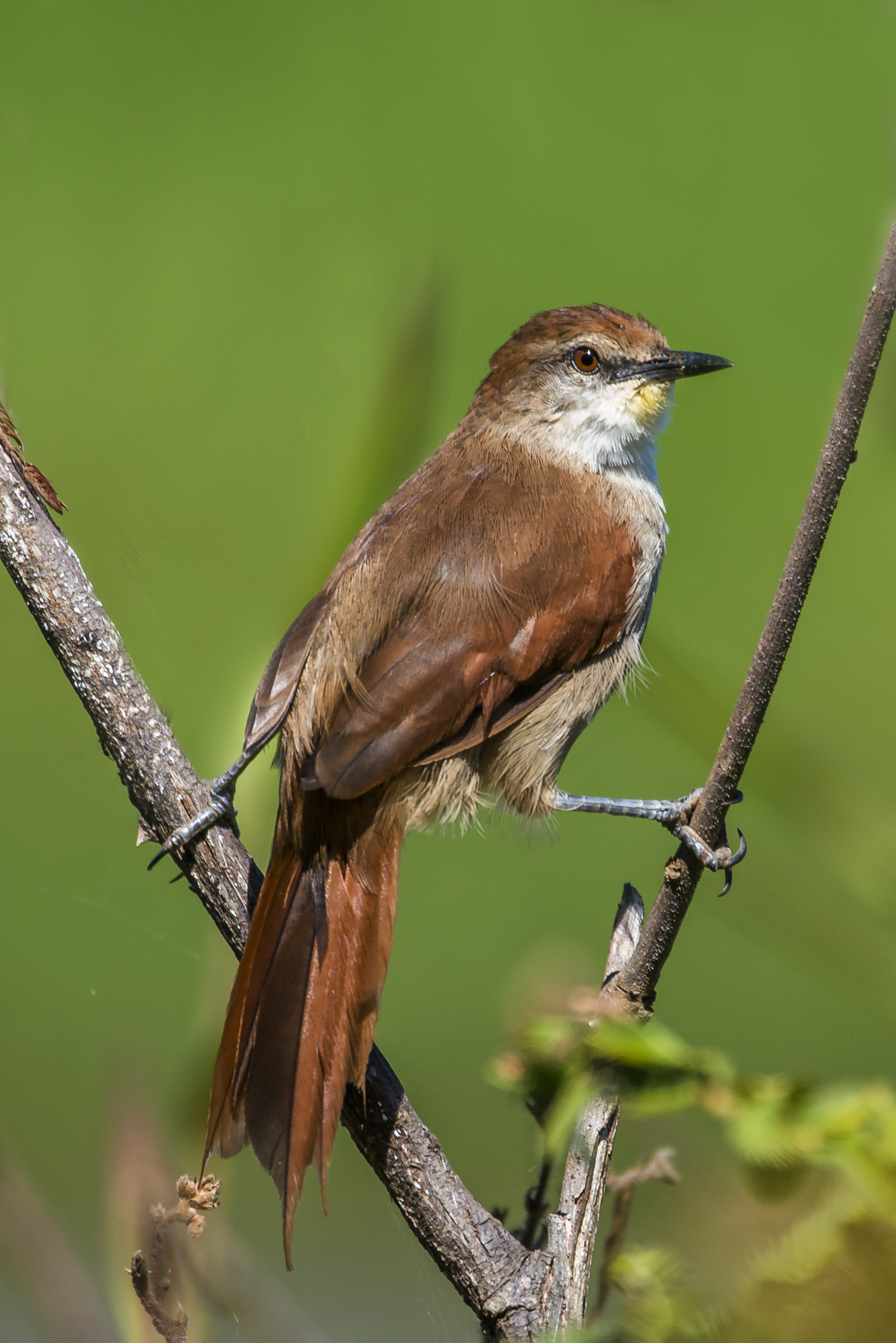 nome em inglês Yellow-chinned Spinetail, espécie sem dimorfismo sexual, foto realizada em Jaú/SP, na região da Marambaia.